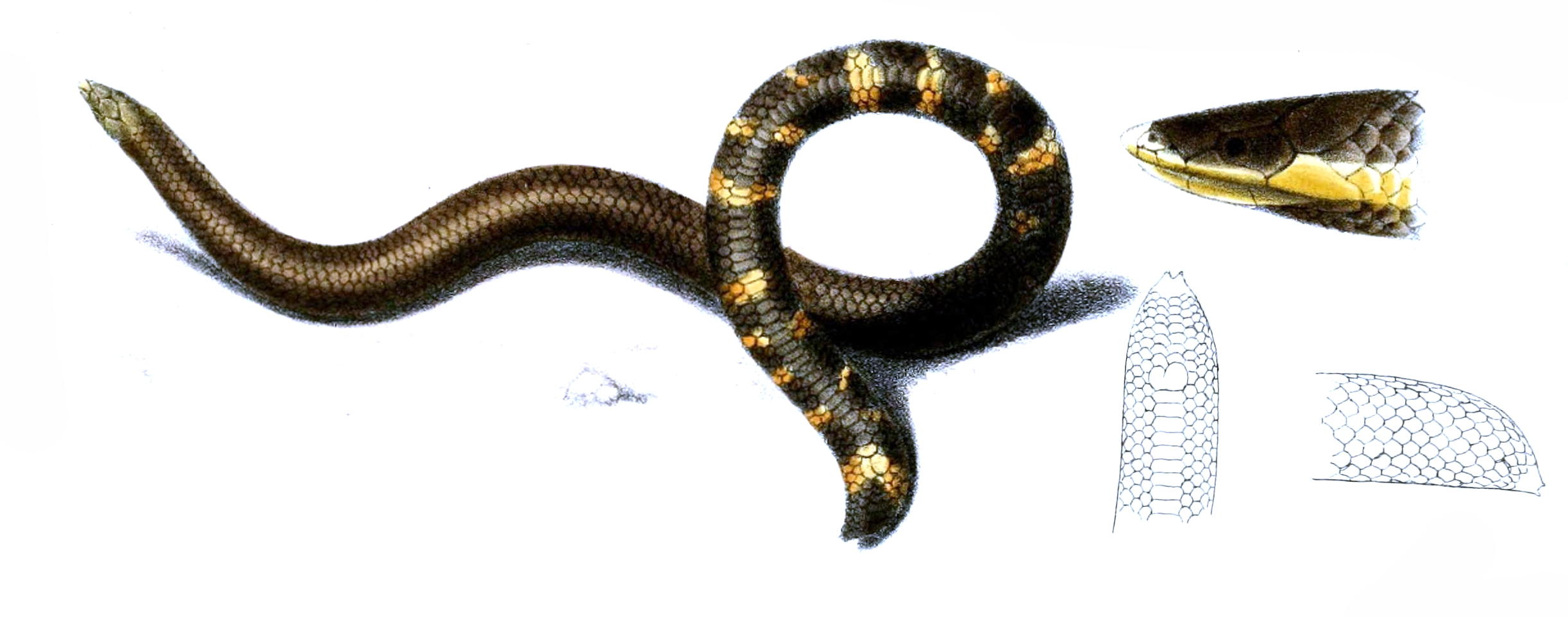 Plectrurus pulneyensis